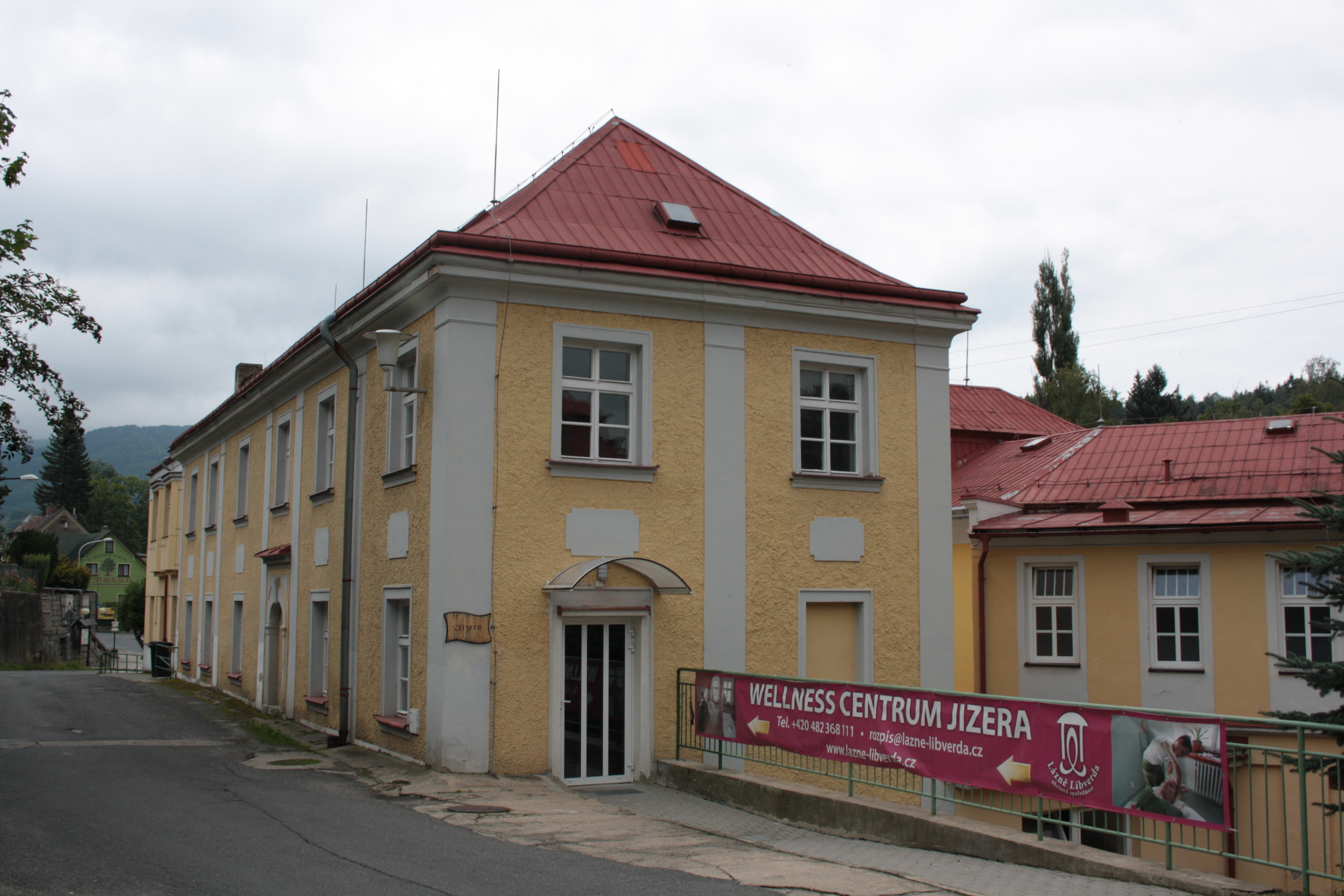 Lázeňský dům Jizera (dům číslo popisné 116).